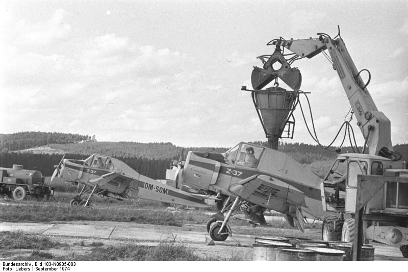 LPG Orlatal, Düngung aus der Luft ADN-ZB/Liebers/5.9.74/Bez. Gera: Mit Flugzeugen vom Typ Z-37 "Cmelak" bringen die Piloten vom agrochemischen Zentrum Neustadt auf den Feldern der LPG Pflanzenproduktion "Orlatal" im Kreis Pößneck Dünger und Pflanzenschutzmittel aus. Der Landwirtschaftsbetrieb hat in diesem Jahr Maschinen für rund 500 Flugstunden geschartert.